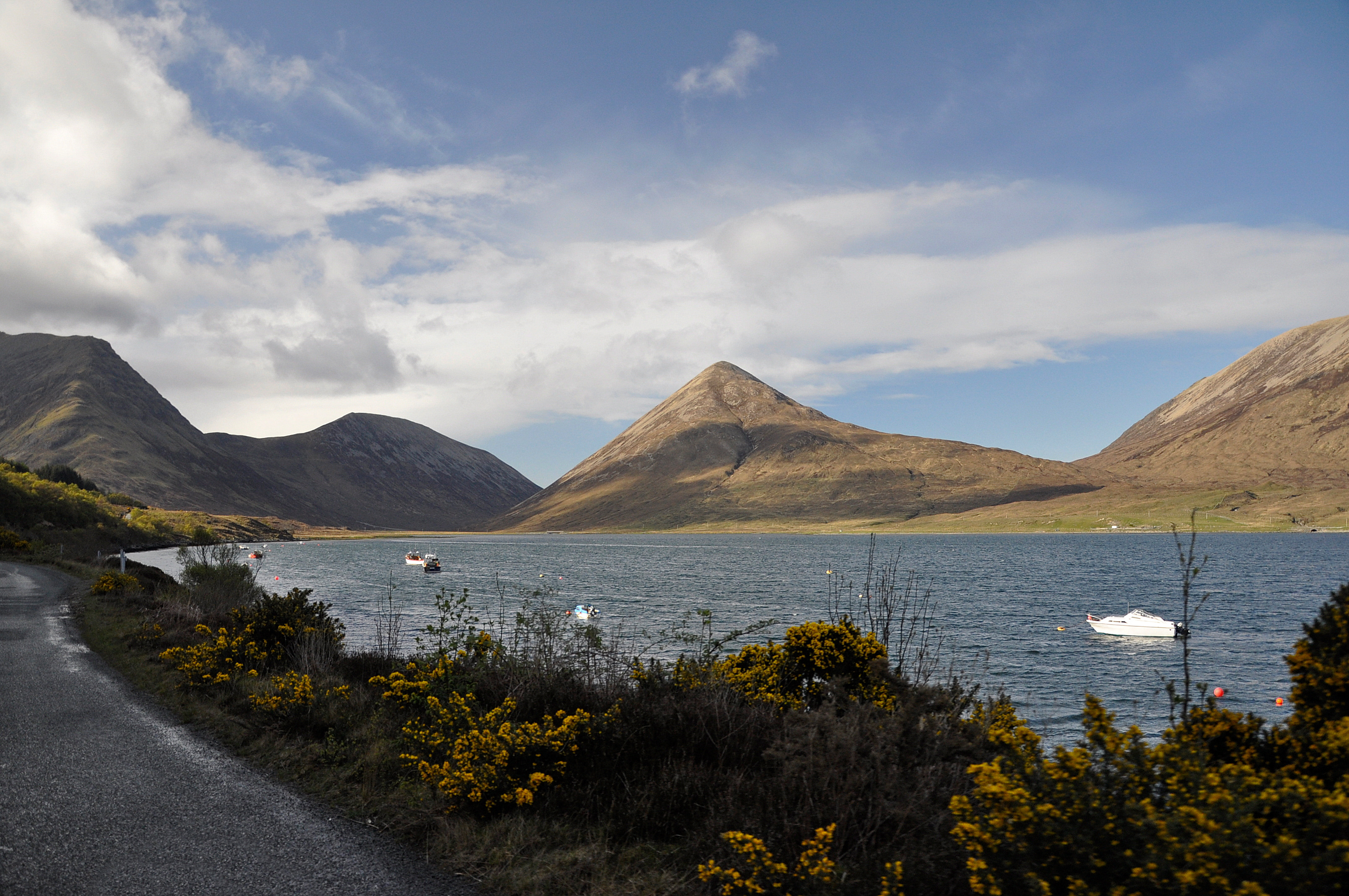 Loch Slapin met Beinn na Cro in het midden, Skye, Schotland